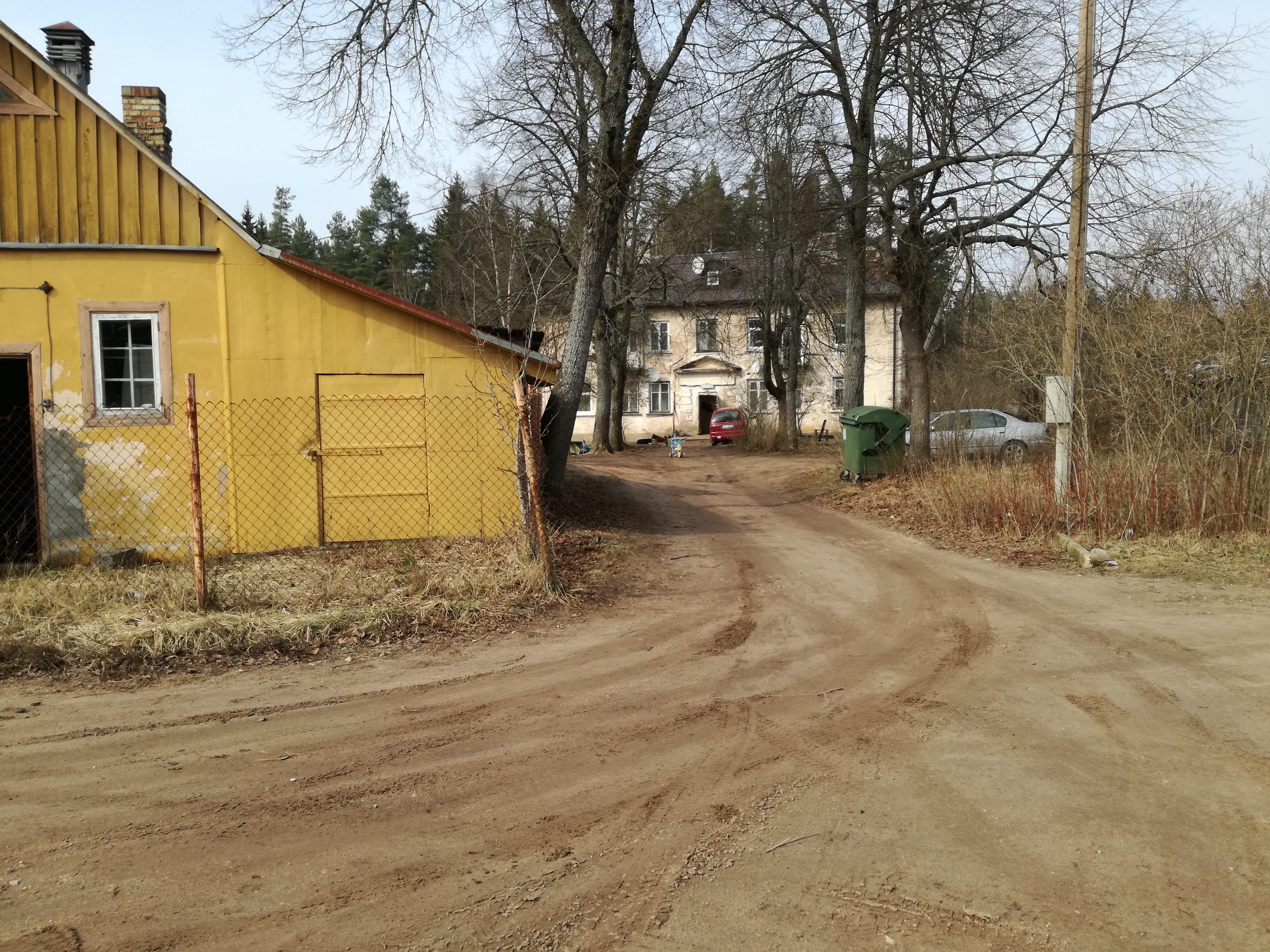 Kūdras ciema apbūve